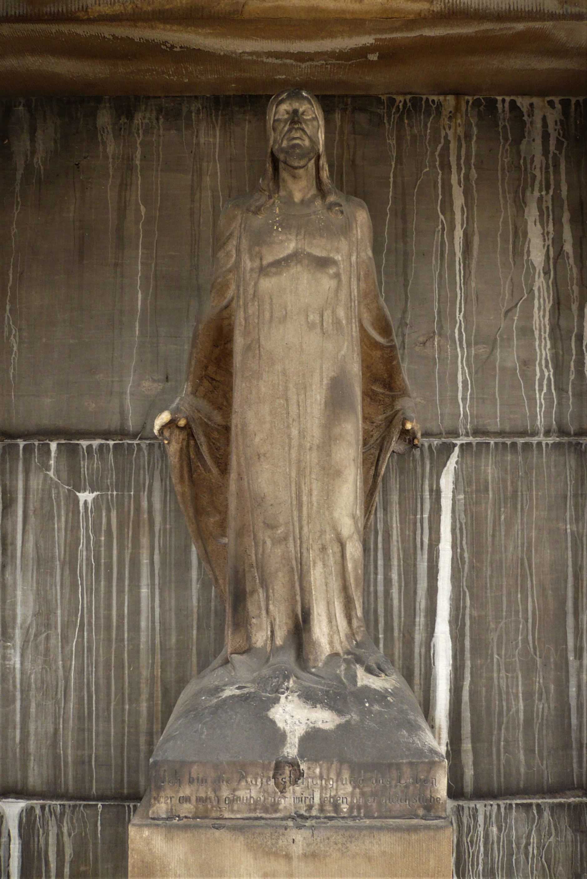 Figura Jezusa w grobowcu rodziny Nave